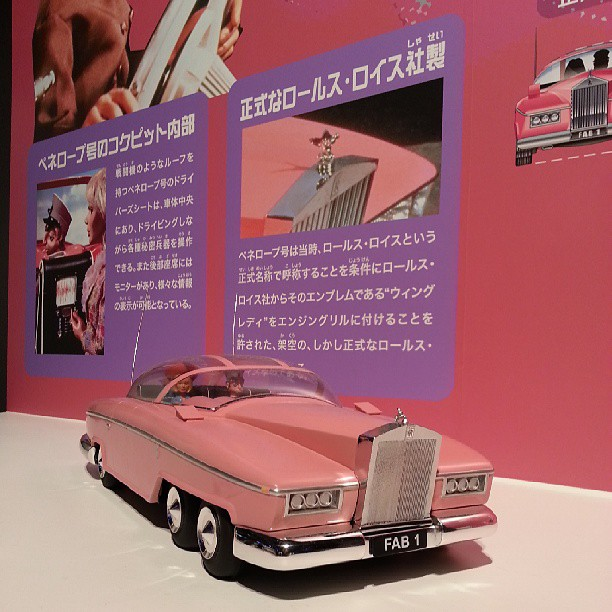 Rolls-Royce FAB 1 (1960s) of Lady Penelope, Thunderbirds Exhibition in Miraikan, Tokyo, 2013 “昨日行ってきたサンダーバード博@ 日本科学未来館。ロールス・ロイスというブランド。知財屋としての1枚。”